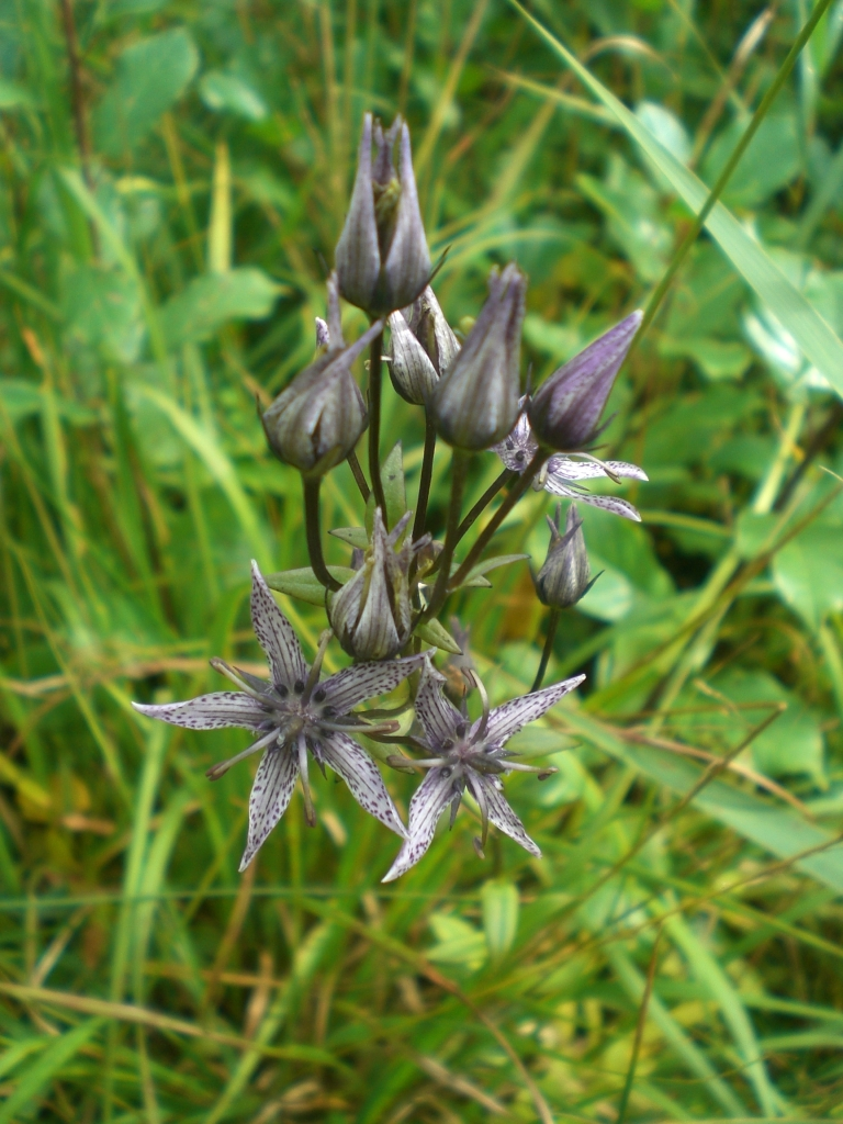 Blühendes Exemplar des Sumpfenzians (Swertia perennis) im NSG Quaßliner Moor, Mecklenburg-Vorpommern